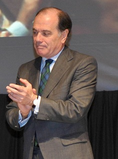 Premio de Honor José Rolando Álvarez, presidente del Grupo Norte, y Tomás Villanueva, consejero de Economía y Empleo de la Junta de Castilla y León.